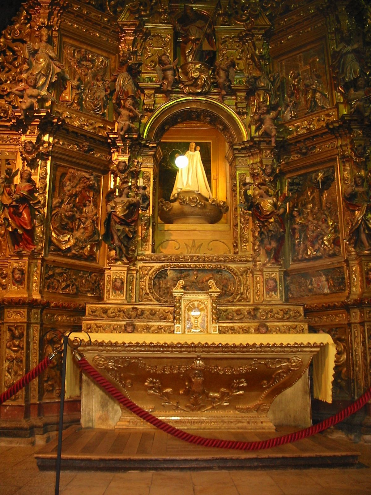 Ermitage de Font-Romeu, Pyrénées-Orientales, France